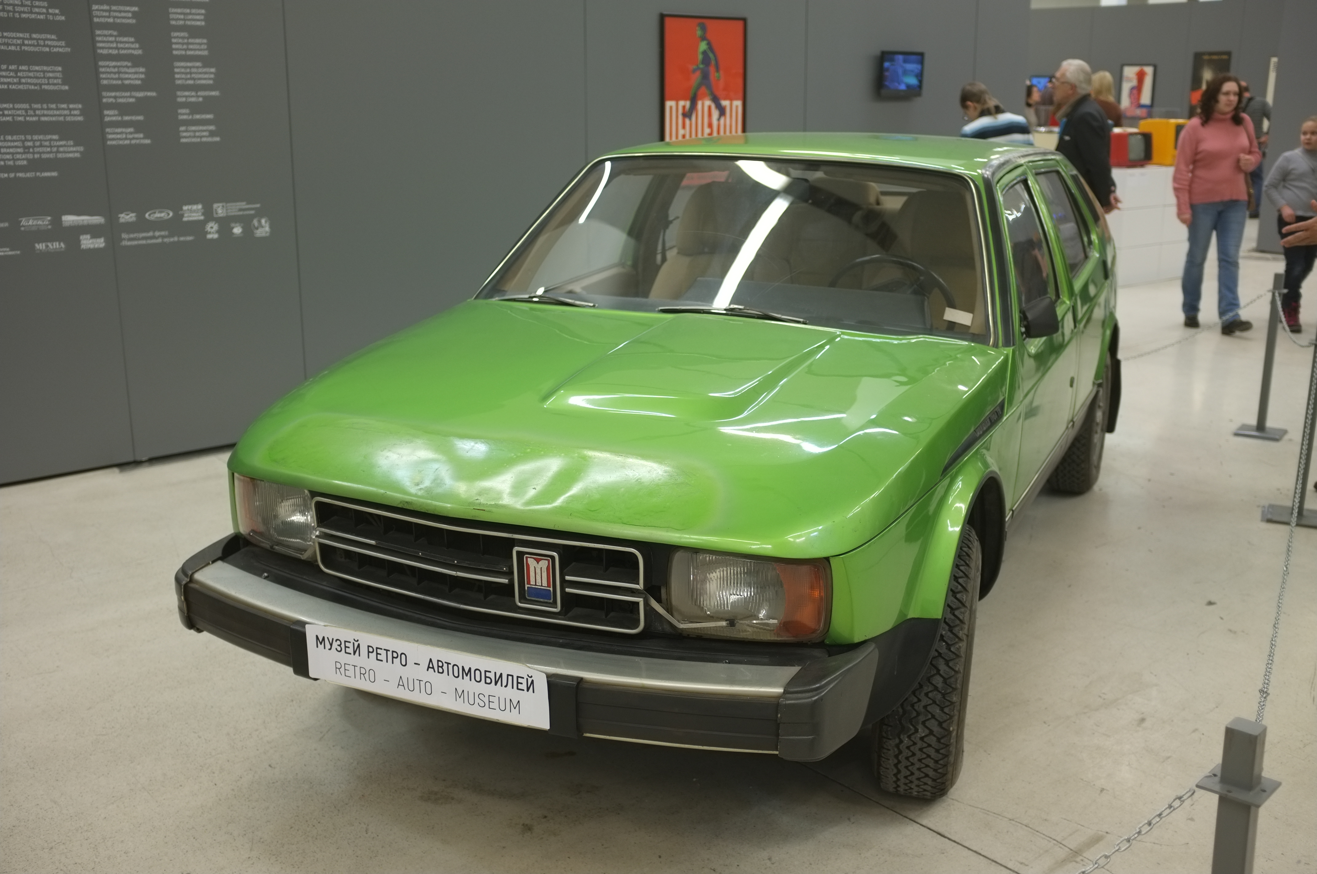 Москвич С-1, не поступивший в серийное производство (1970-ые, СССР)